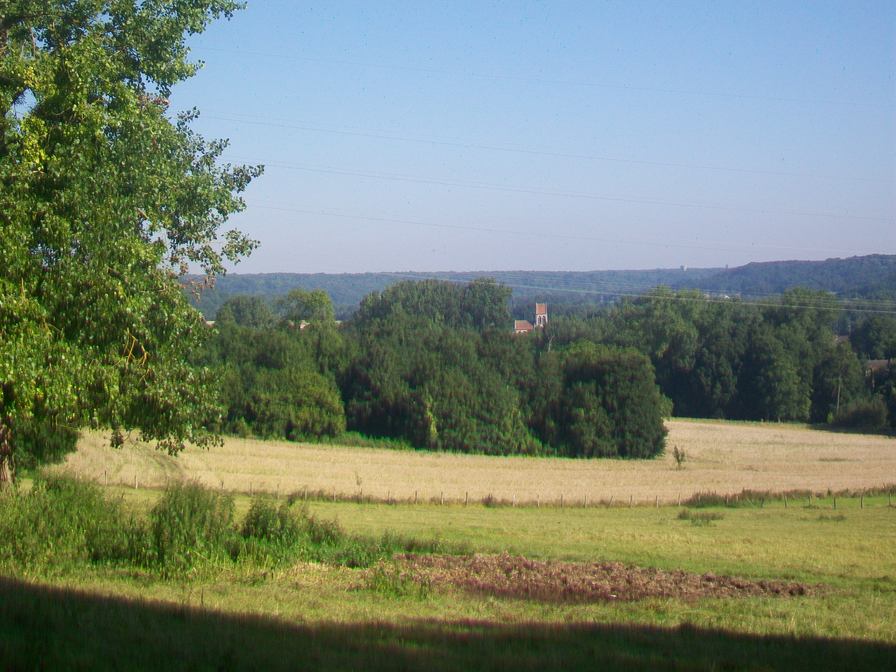 Vue vers le village depuis le sud-ouest.